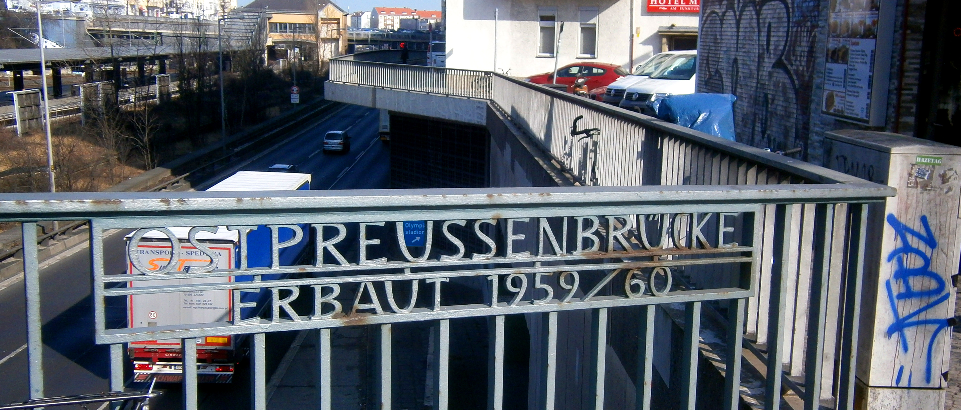 Die Ostpreußenbrücke im Berliner Bezirk Charlottenburg-Wilmersdorf überführt die Neue Kantstraße zwischen dem Ortsteil Charlottenburg und Westend über die Berliner Ringbahn und den Stadtautobahnring B 100. Im Bild die im Geländer eingelassene Bezeichnung mit Bauzeit am Nordostende der Brücke.